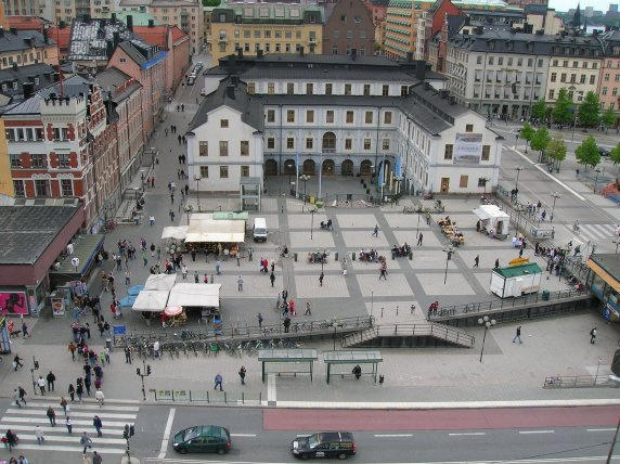 Ryssgården square at the Slussen area, Södermalm, Stockholm, Sweden. Photo taken from the Katarina elevator.